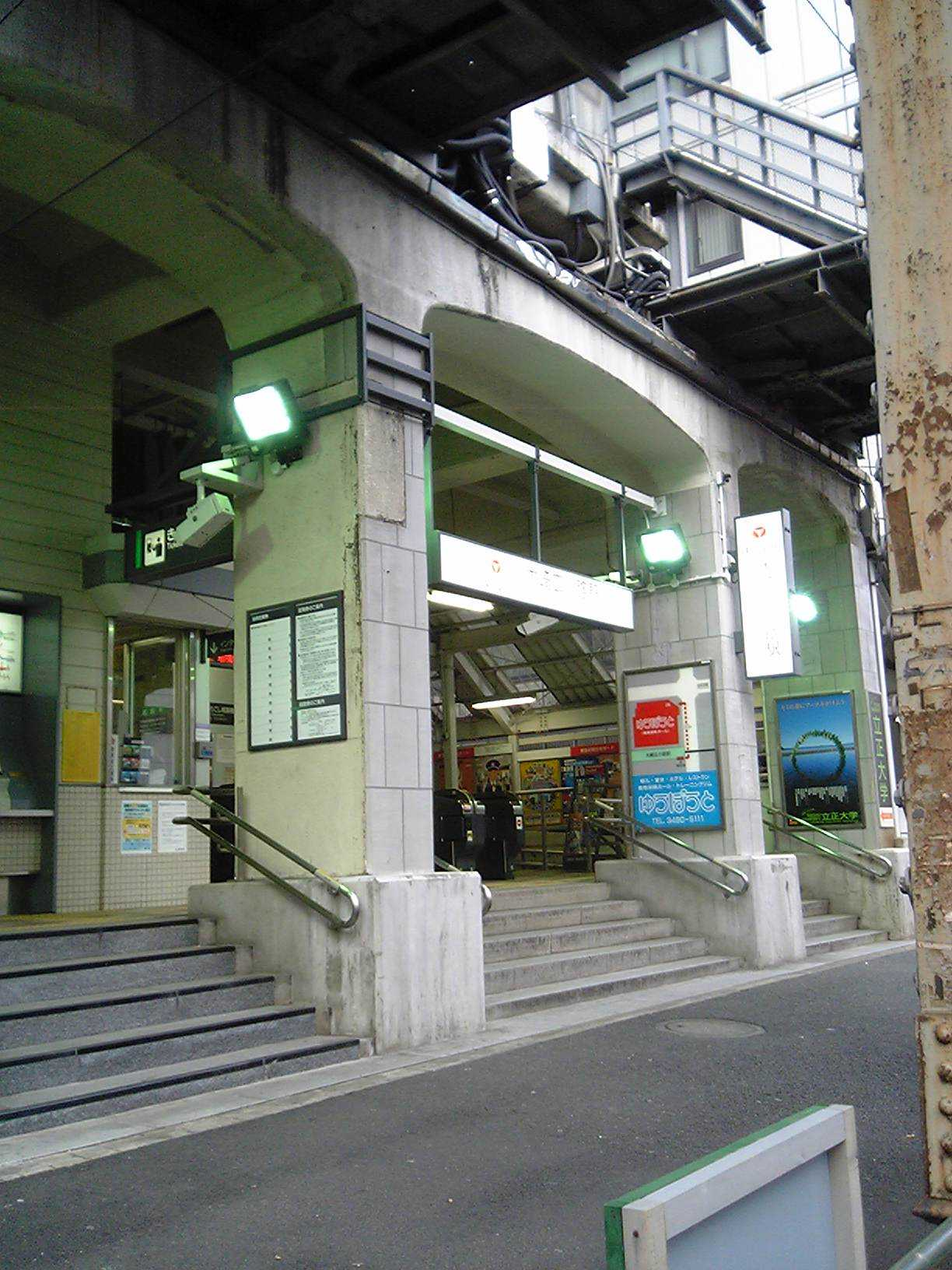 An entrance of Osaki-Hirokoji Station